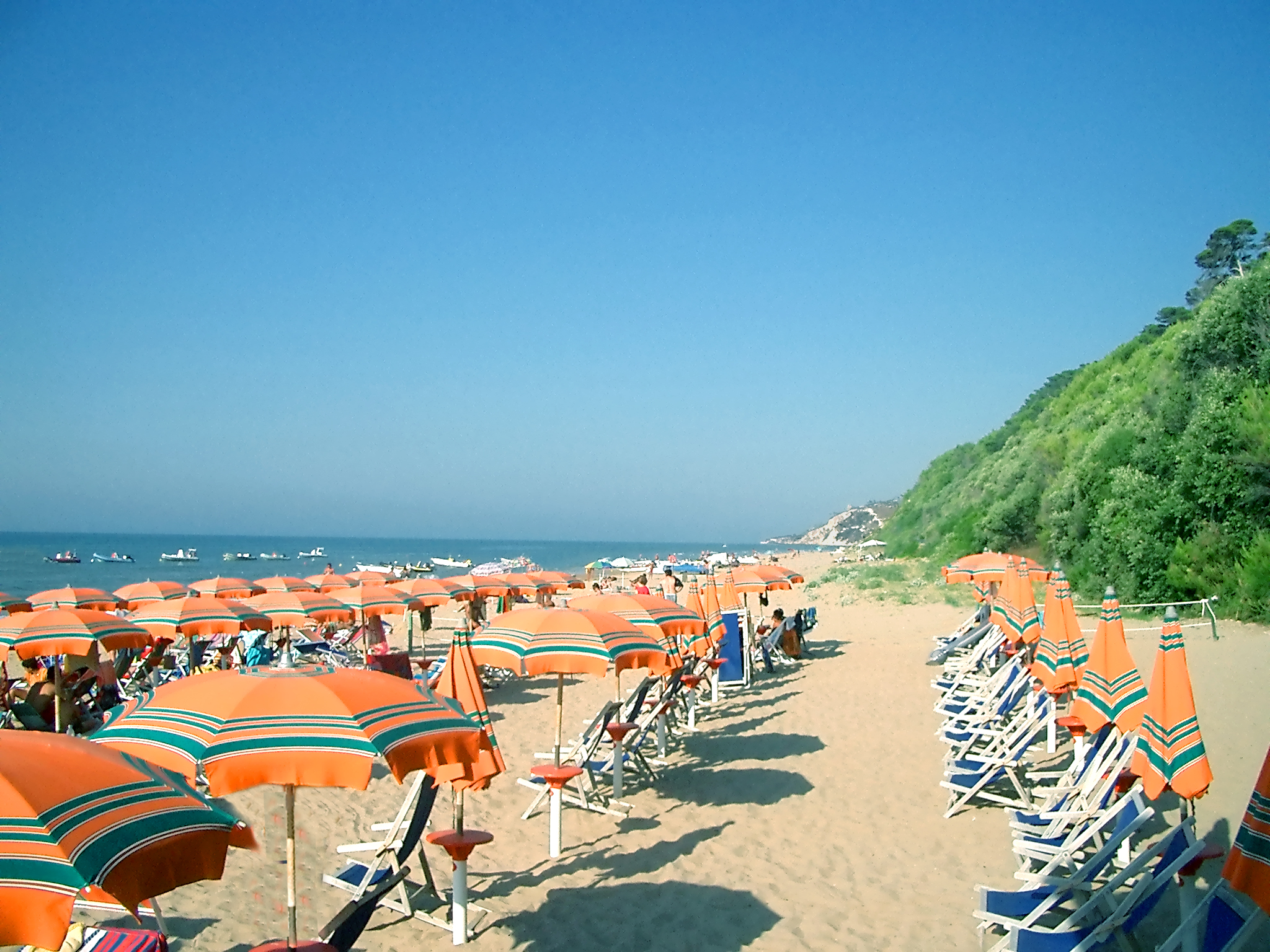 Spiaggia est di San Menaio, in località Valazzo. Sullo sfondo è visibile la punta di MontePucci. Autore: Matteo A. Foto scattata nel settembre 2004.